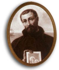 Imagem de Santo Inácio de Azevedo